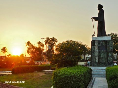 تمثال عبد المحسن الكاظمي في بغداد تصوير: مهدي زاهد 2015